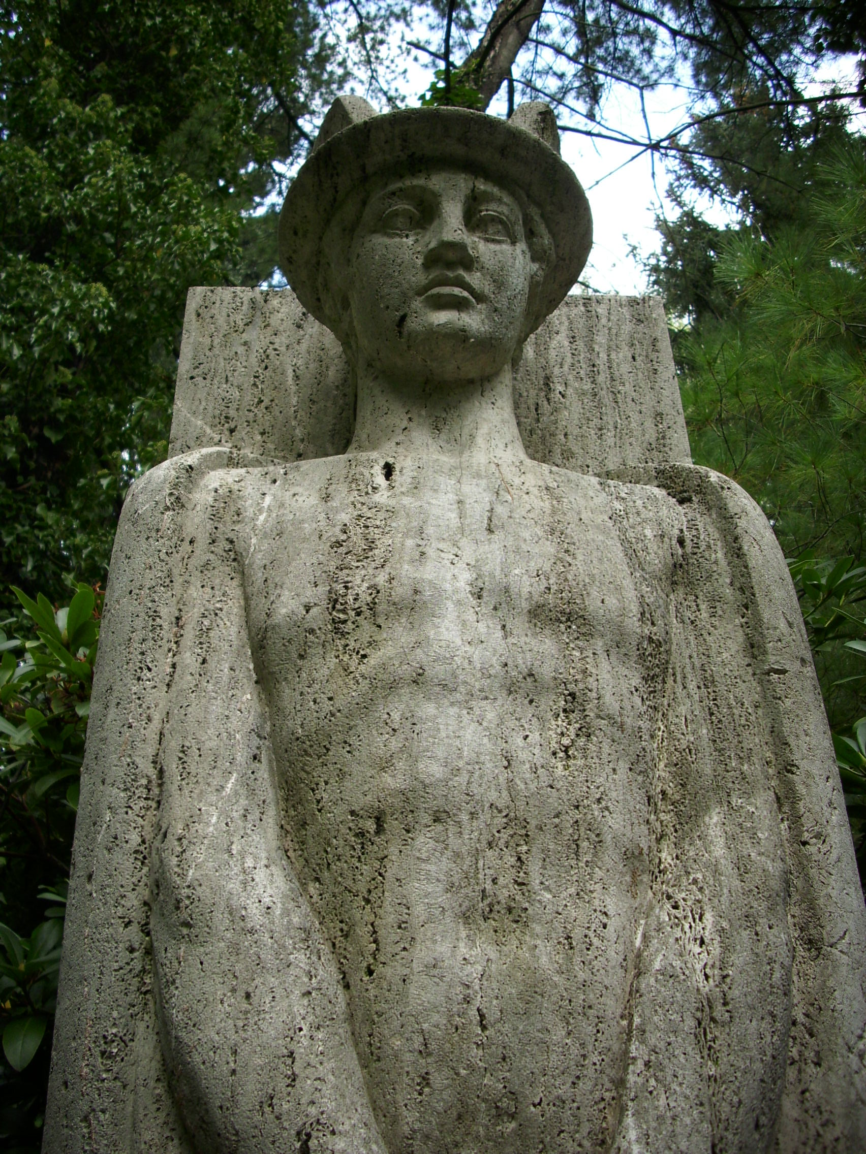 Paul Stuckenbruck: Detail Grabmal Langhoff. Südfriedhof, Leipzig